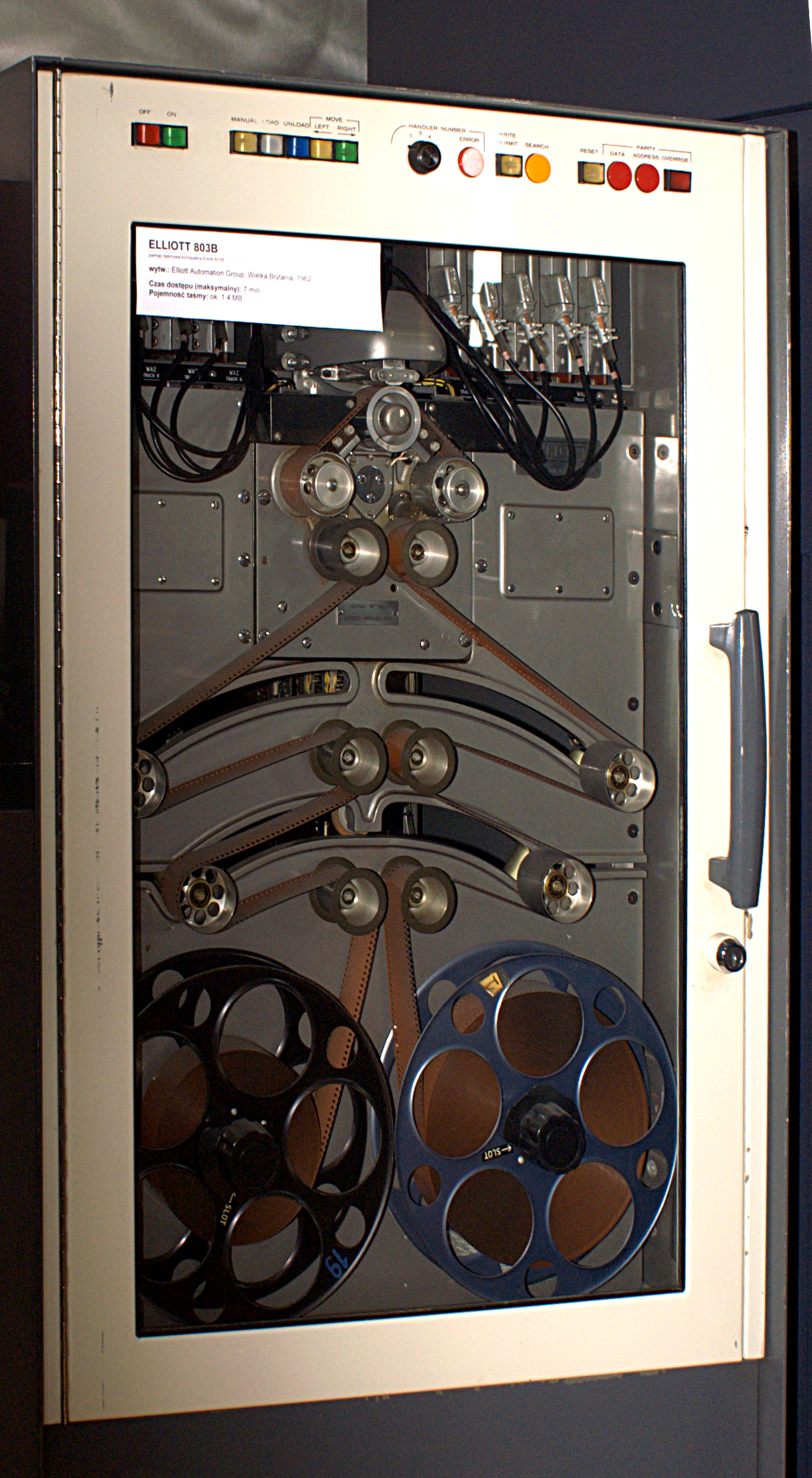 Elliott 803B